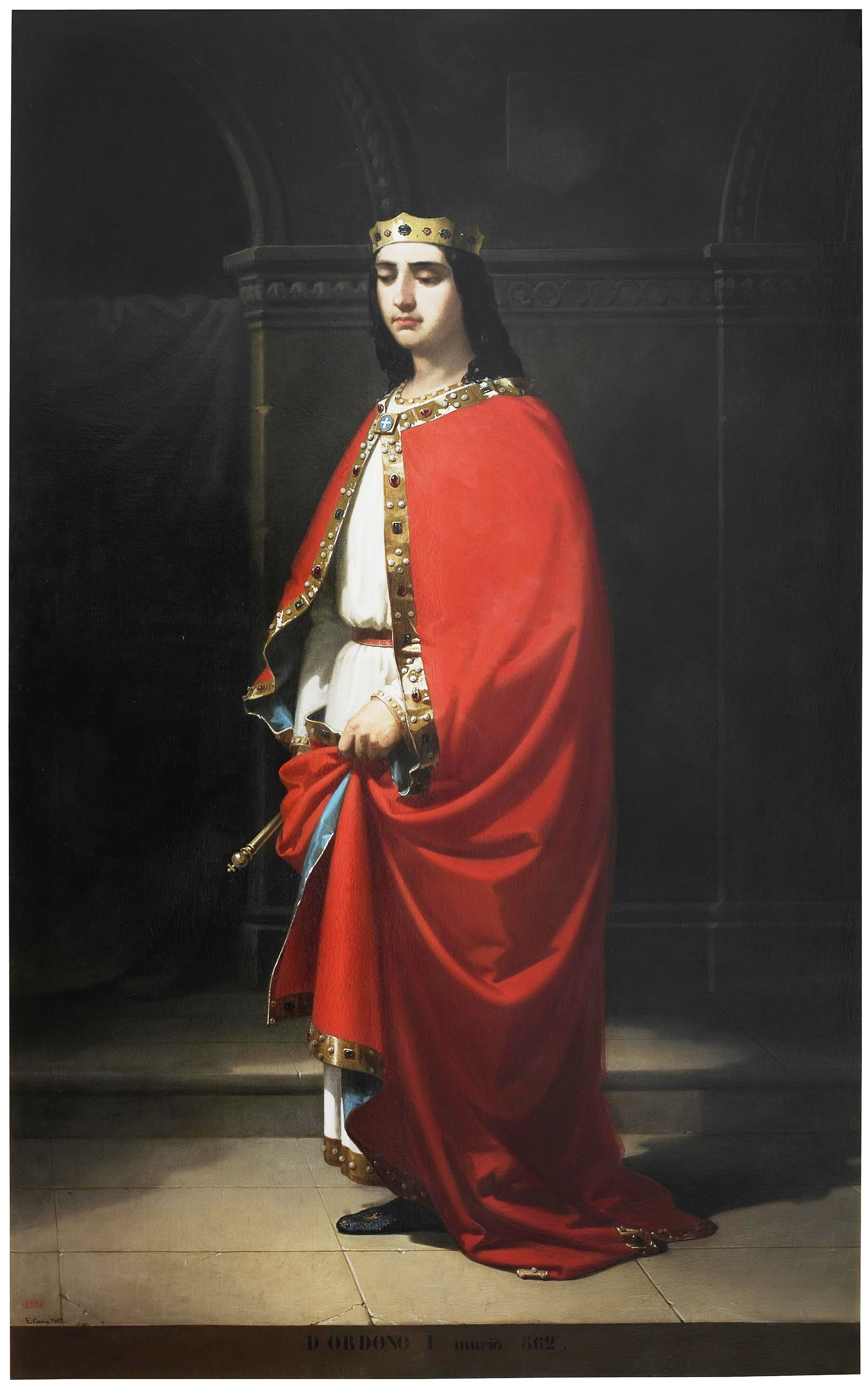 Retrato imaginario del rey Ordoño I de Asturias (821-866), hijo y sucesor del rey Ramiro I de Asturias y padre de Alfonso III el Magno, rey de Asturias.